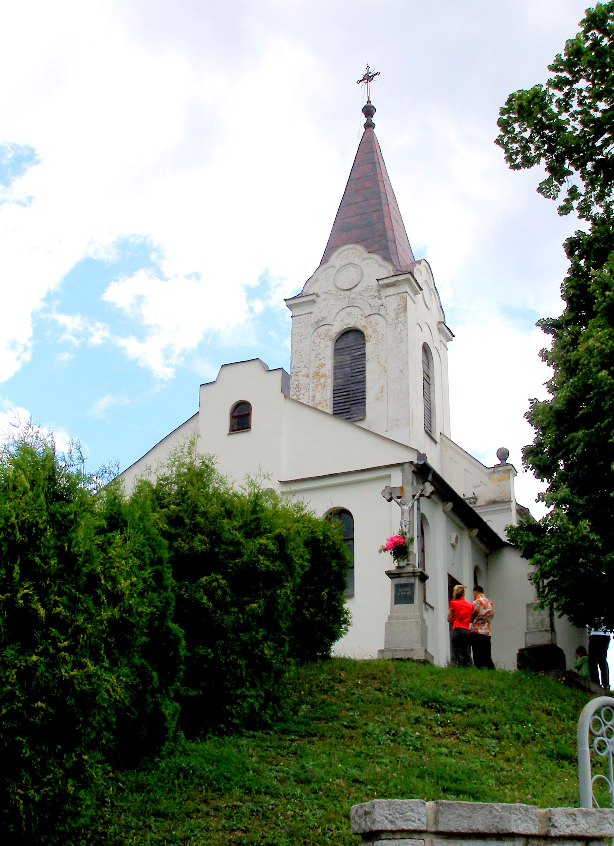 Obec Jakubovany okres Sabinov